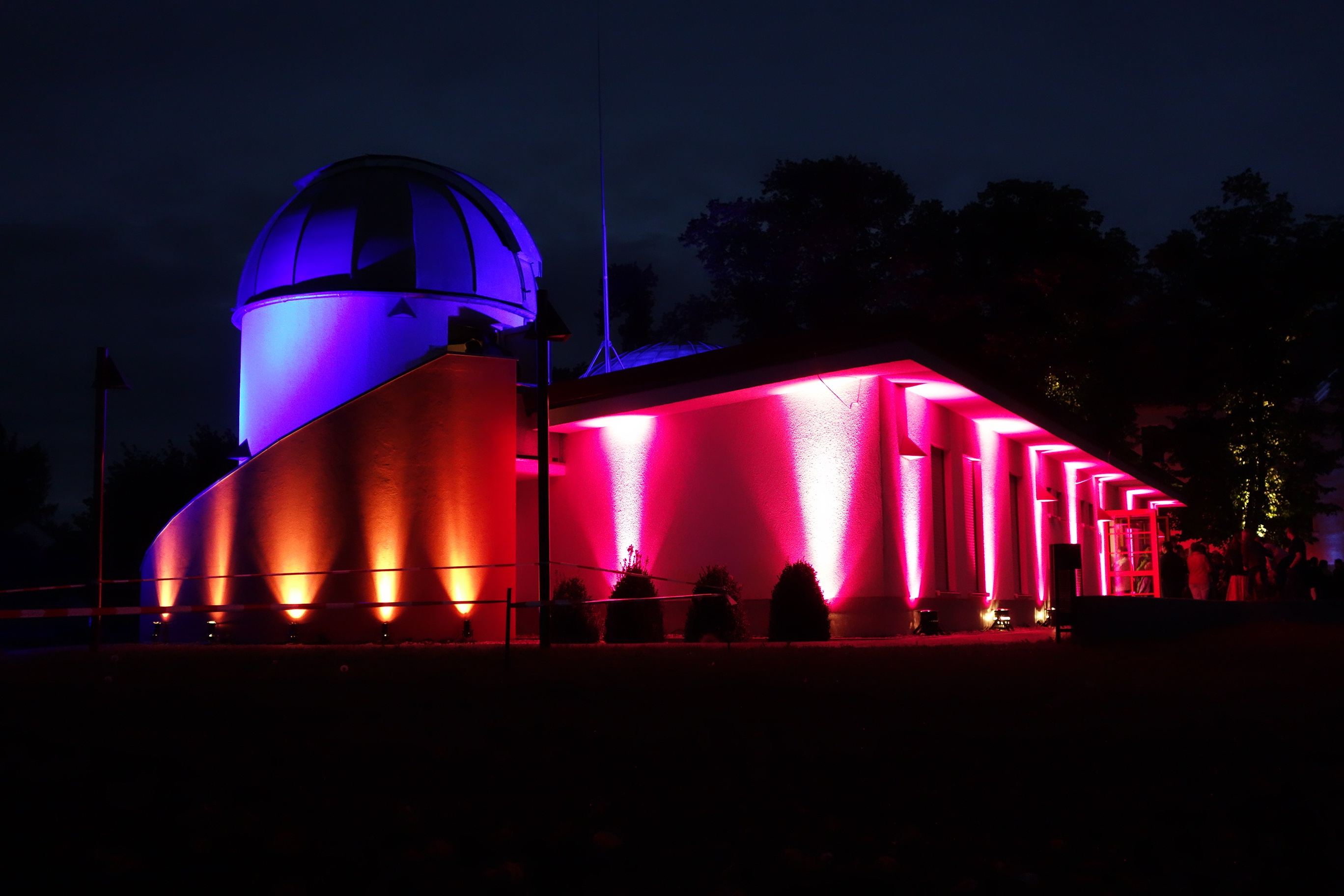 Lange Nacht der Sterne 2013 in der Astronomischen Station „Samuel Heinrich Schwabe“ Dessau-Roßlau